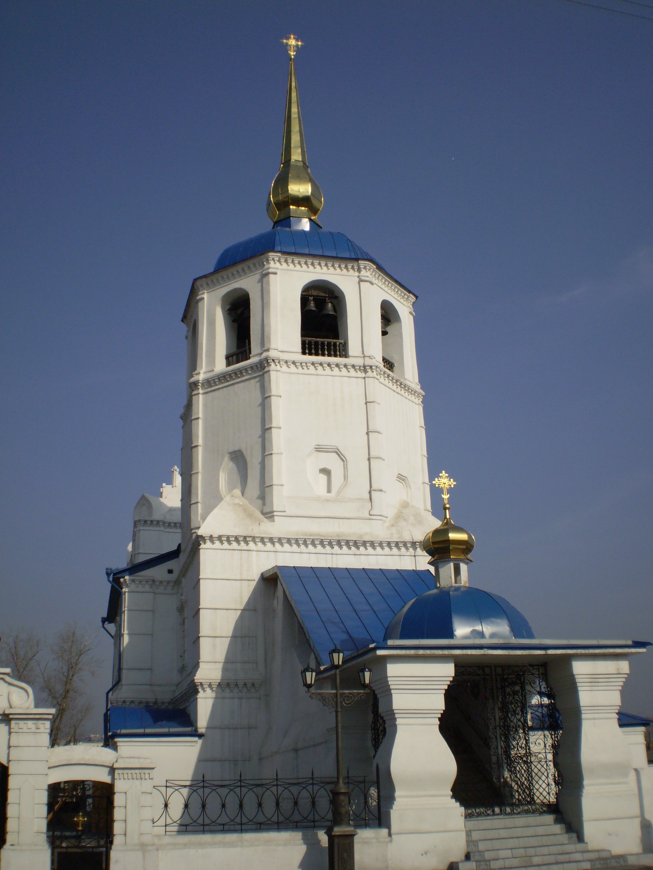 Свято-Одигитриевский собор 1741-1785